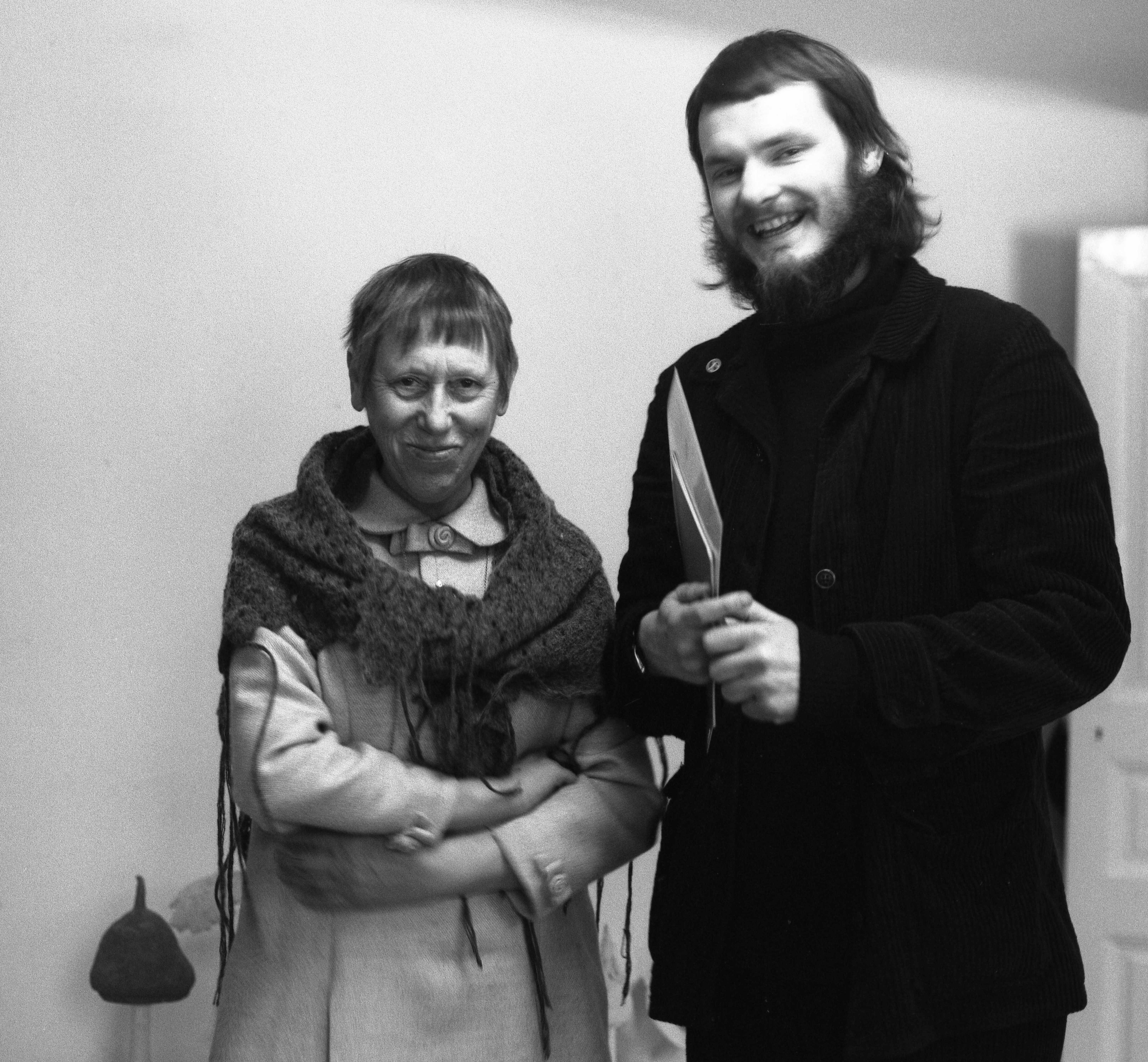 Nils-Gunnar Zanders debututställning på galleri Hos Petra hösten 1971. Petra till vänster och Nils-Gunnar Zander till höger. Foto: John Selbing